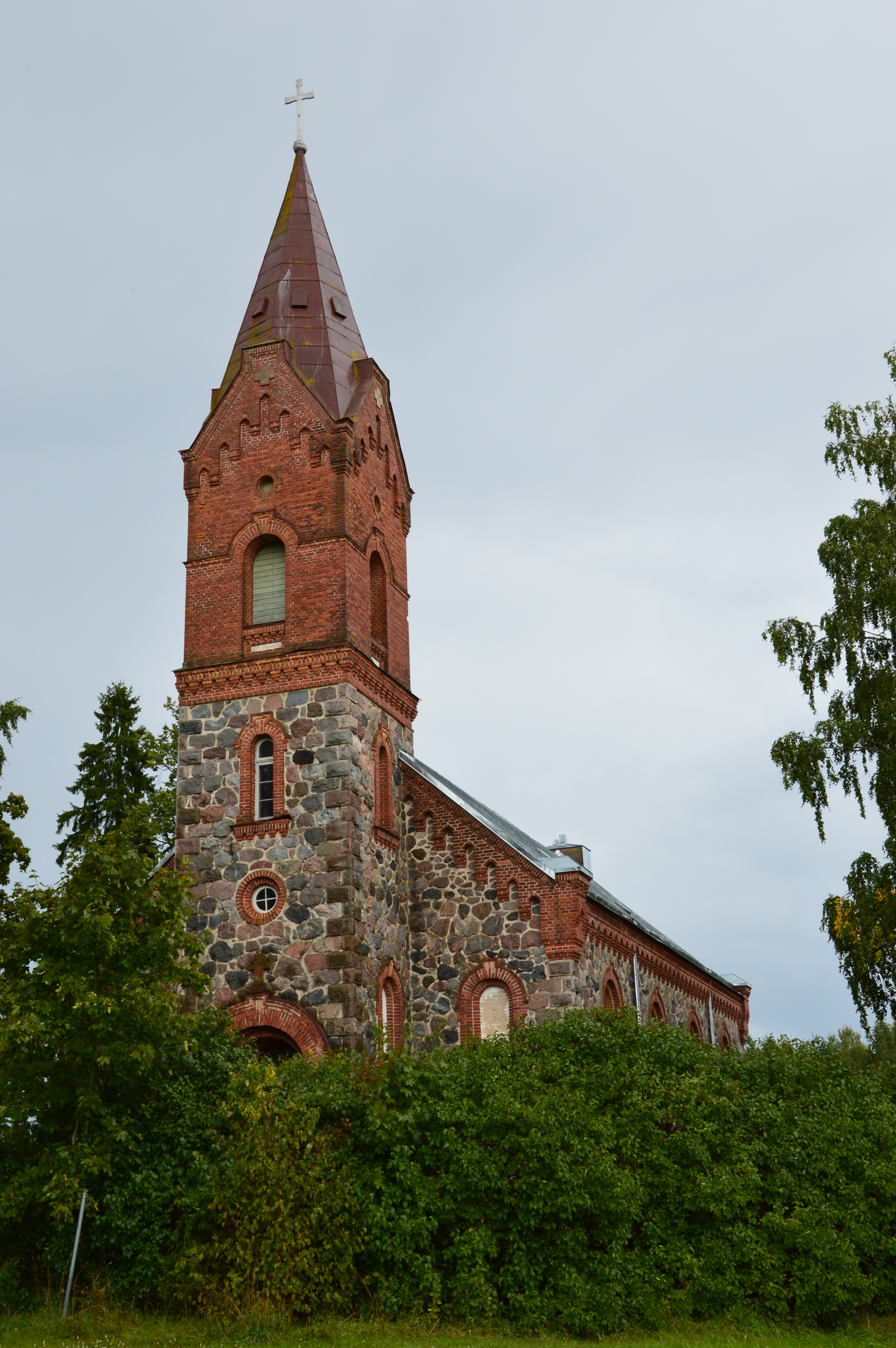 Roosa kirik